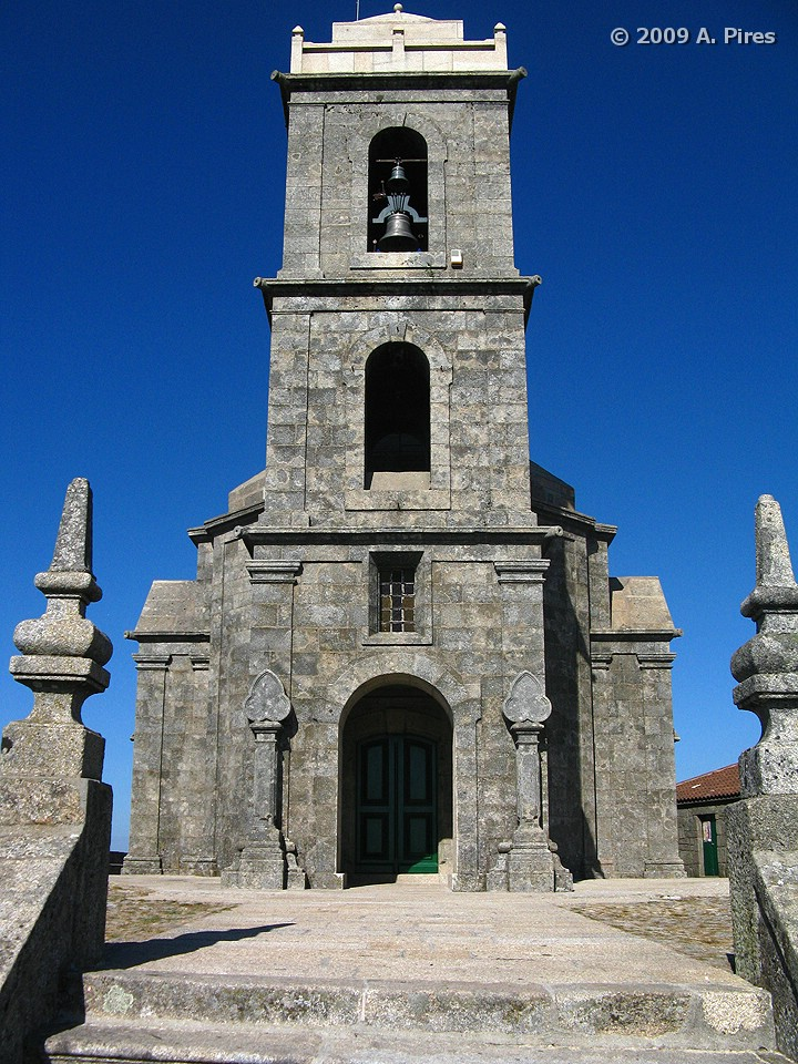 Alto de Nossa Senhora da Graça (Monte Farinha) Vilar de Ferreiros, Mondim de Basto 27 de Agosto de 2009